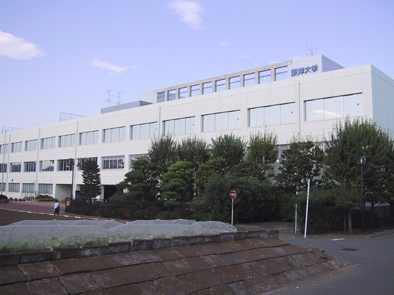 Toyo University Asaka Campus (東洋大学朝霞キャンパス2号館)